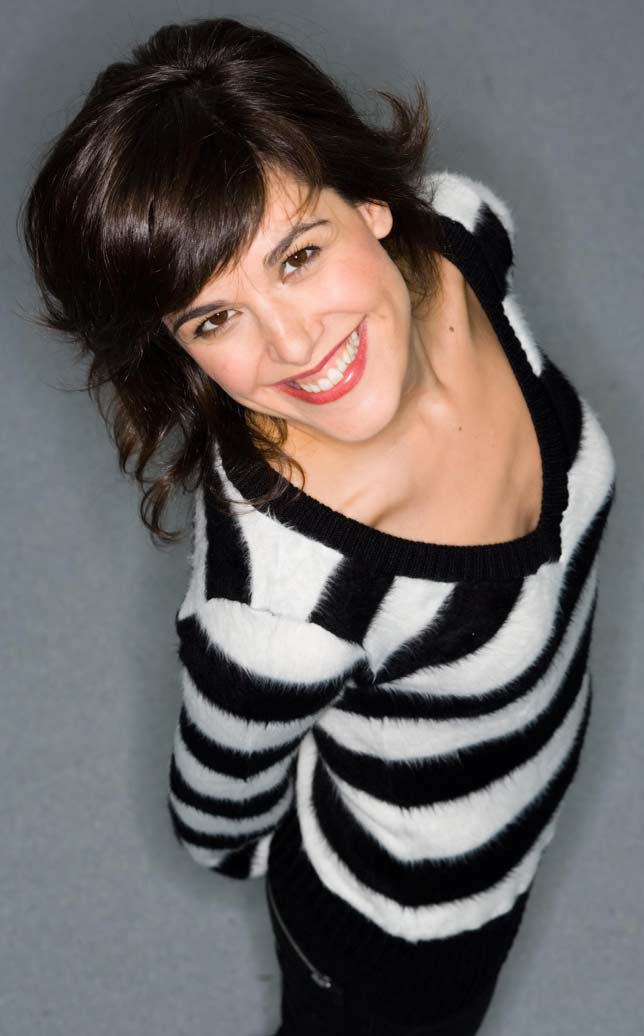 Raquel Sánchez-Silva presentadora española.